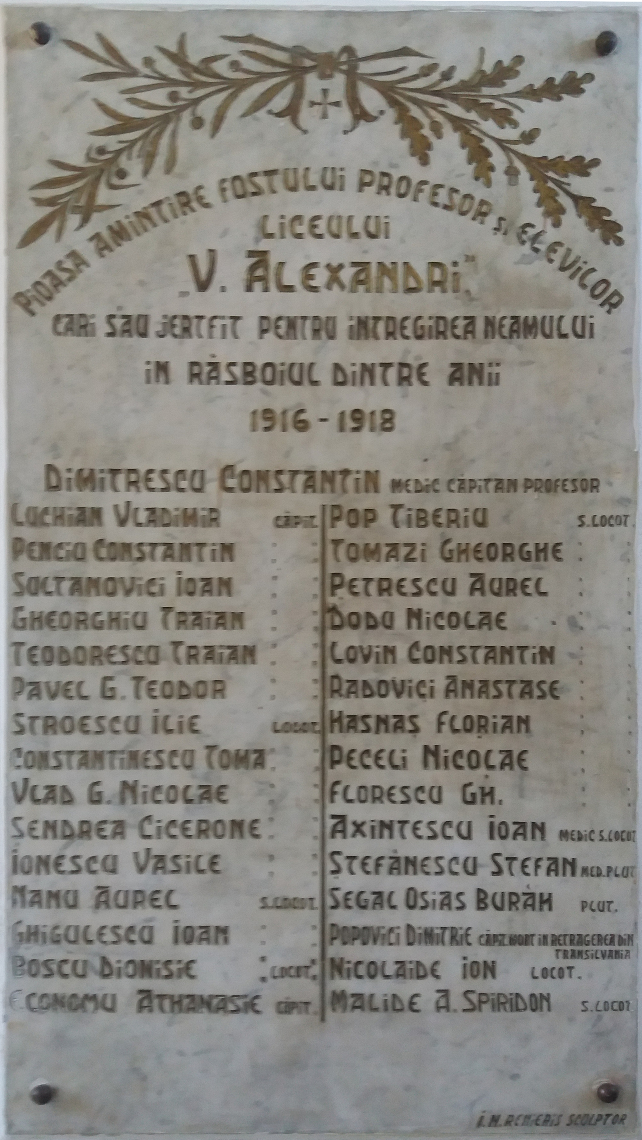 Eroi din Primul Război Mondial, elevi ai Liceului Vasile Alecsandri din Galați